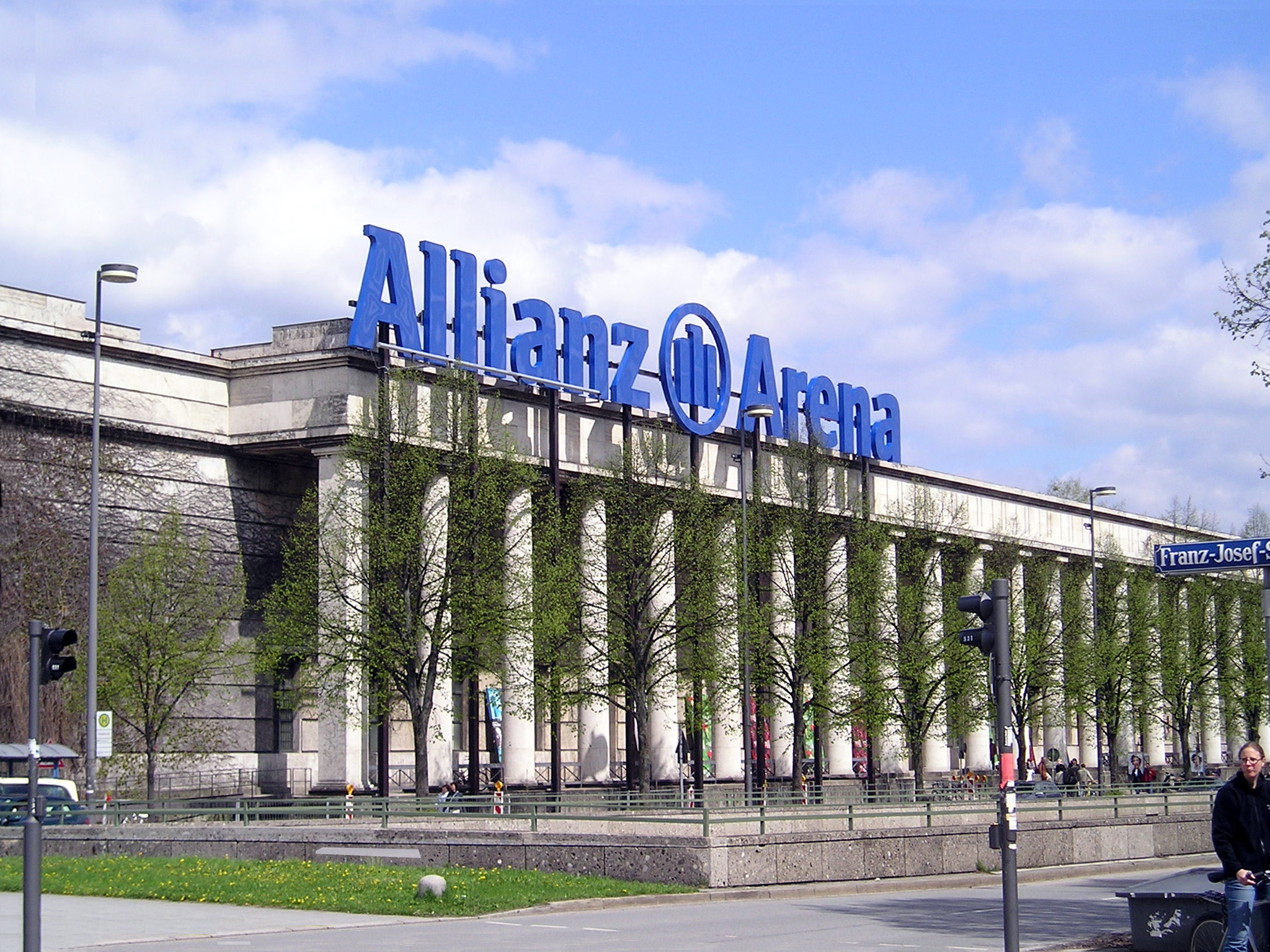 Haus der Kunst in Munich / München during exibition Herzog & de Meuron